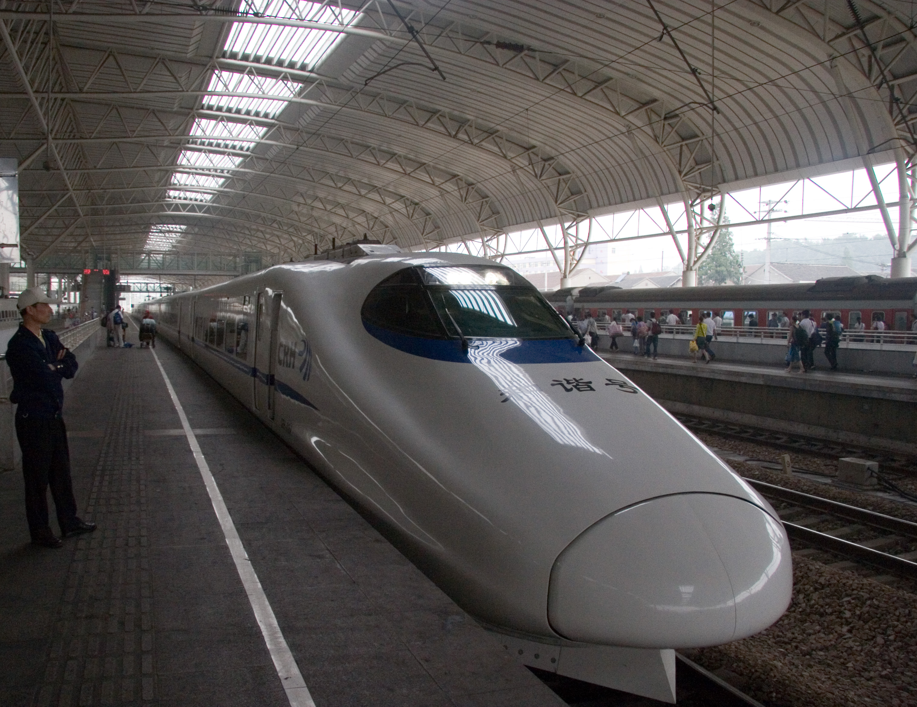 停靠在南京火车站站台的和谐号CRH2A动车组